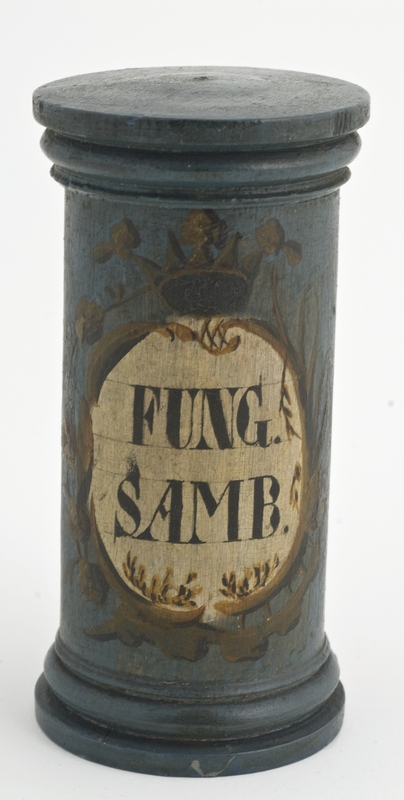 Rokokko trebøsse fra Svaneapoteket i Halden ca 1770. Tilhører Norsk Farmasihistorisk Museum. Foto Fritjof Arentz / Norsk Farmasihistorisk Museum NFA.02877AB.